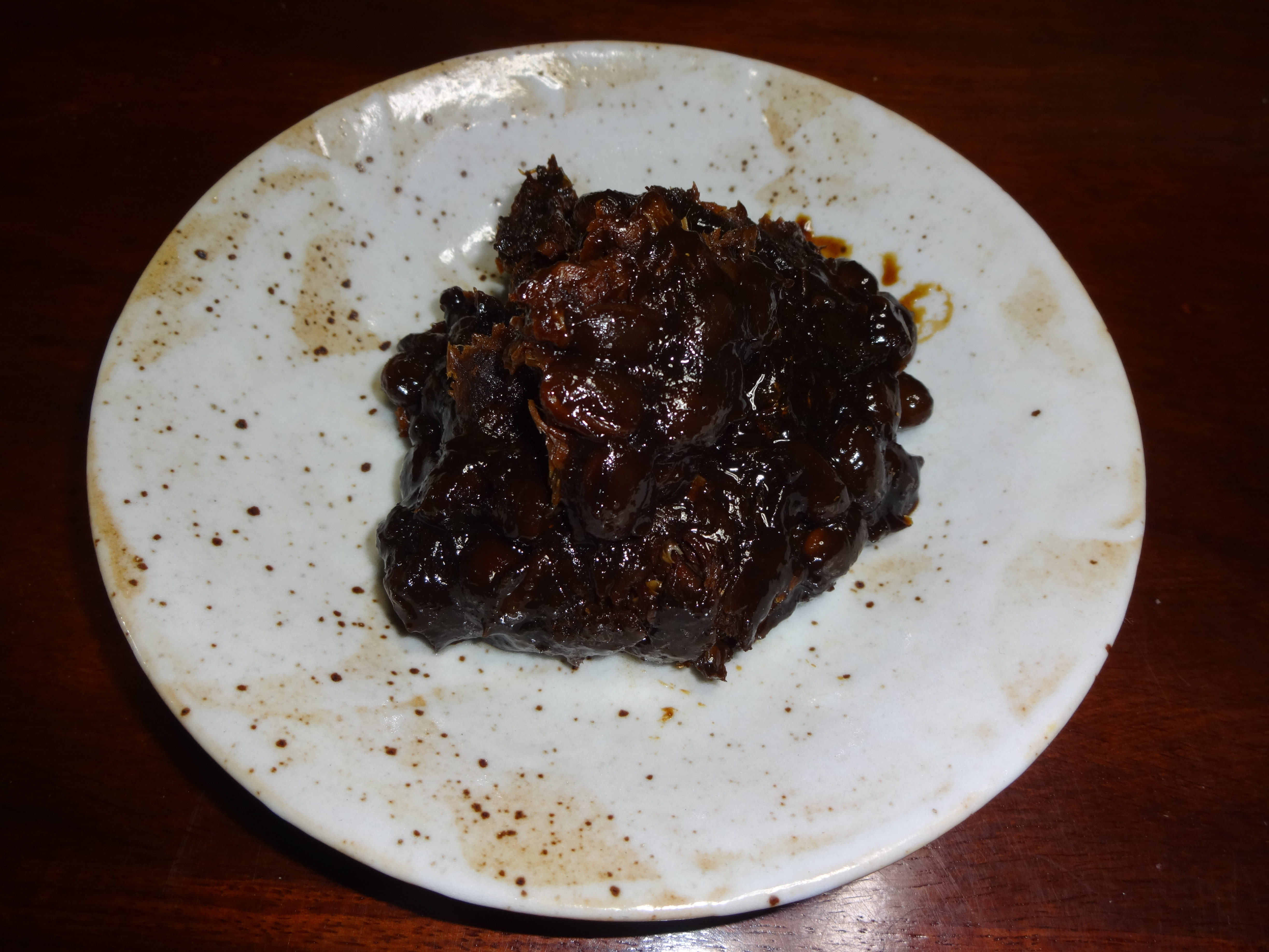 岐阜県、愛知県の郷土料理。フナみそ。